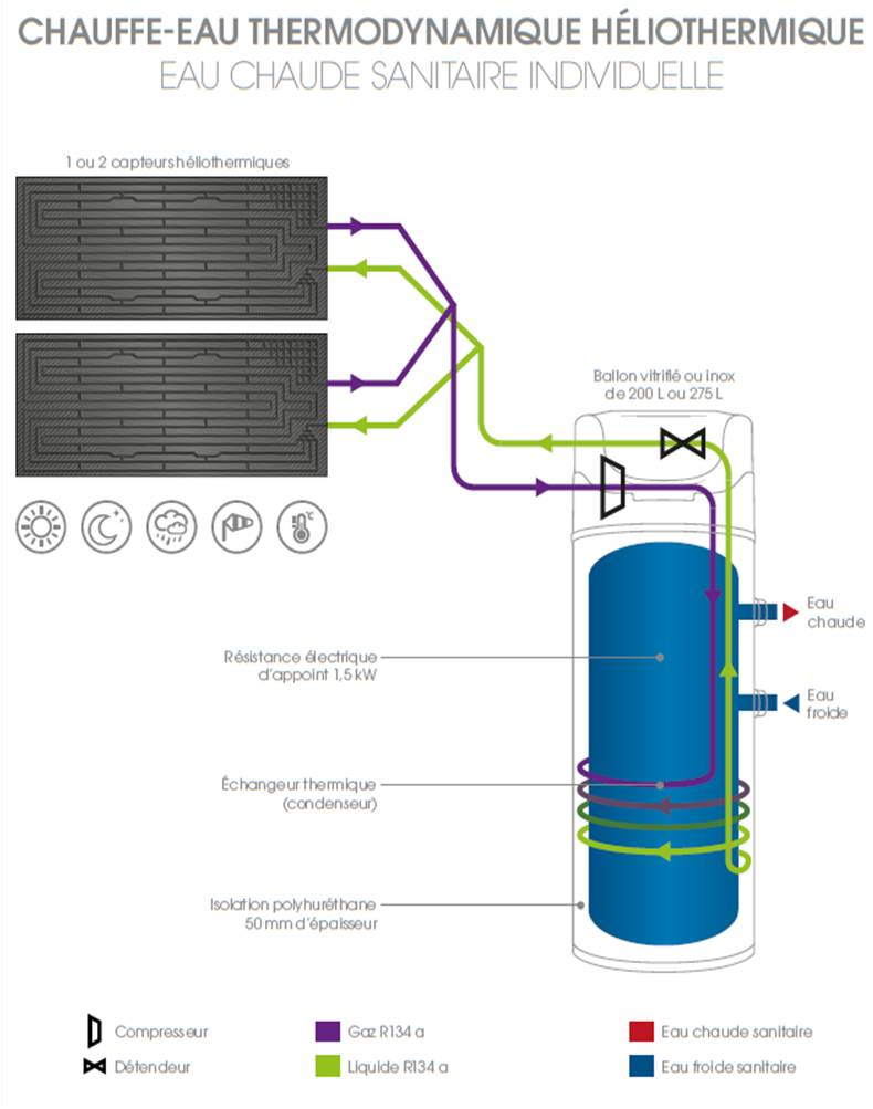 Schéma de fonctionnement d'un chauffe-eau thermodynamique héliothermique CET 275-S